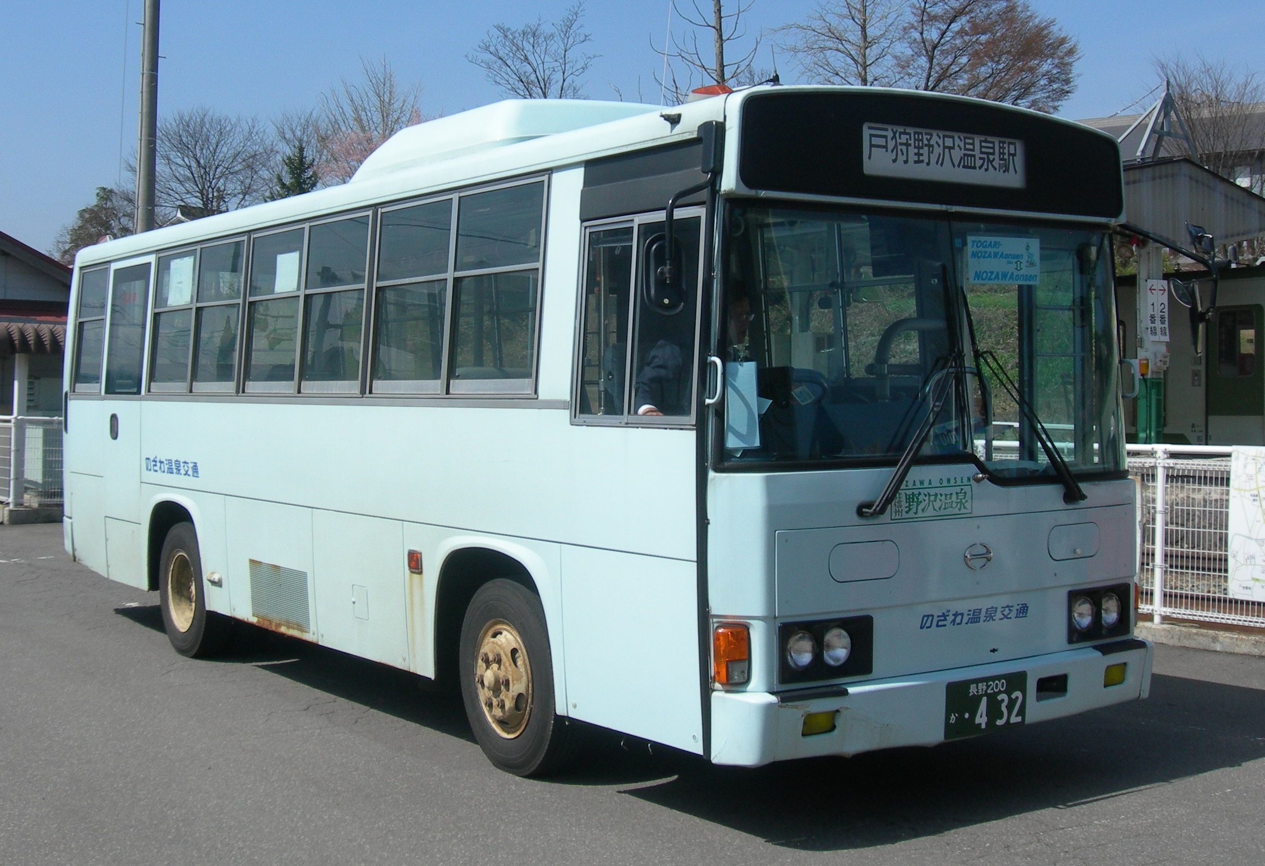 のざわ温泉交通のバス